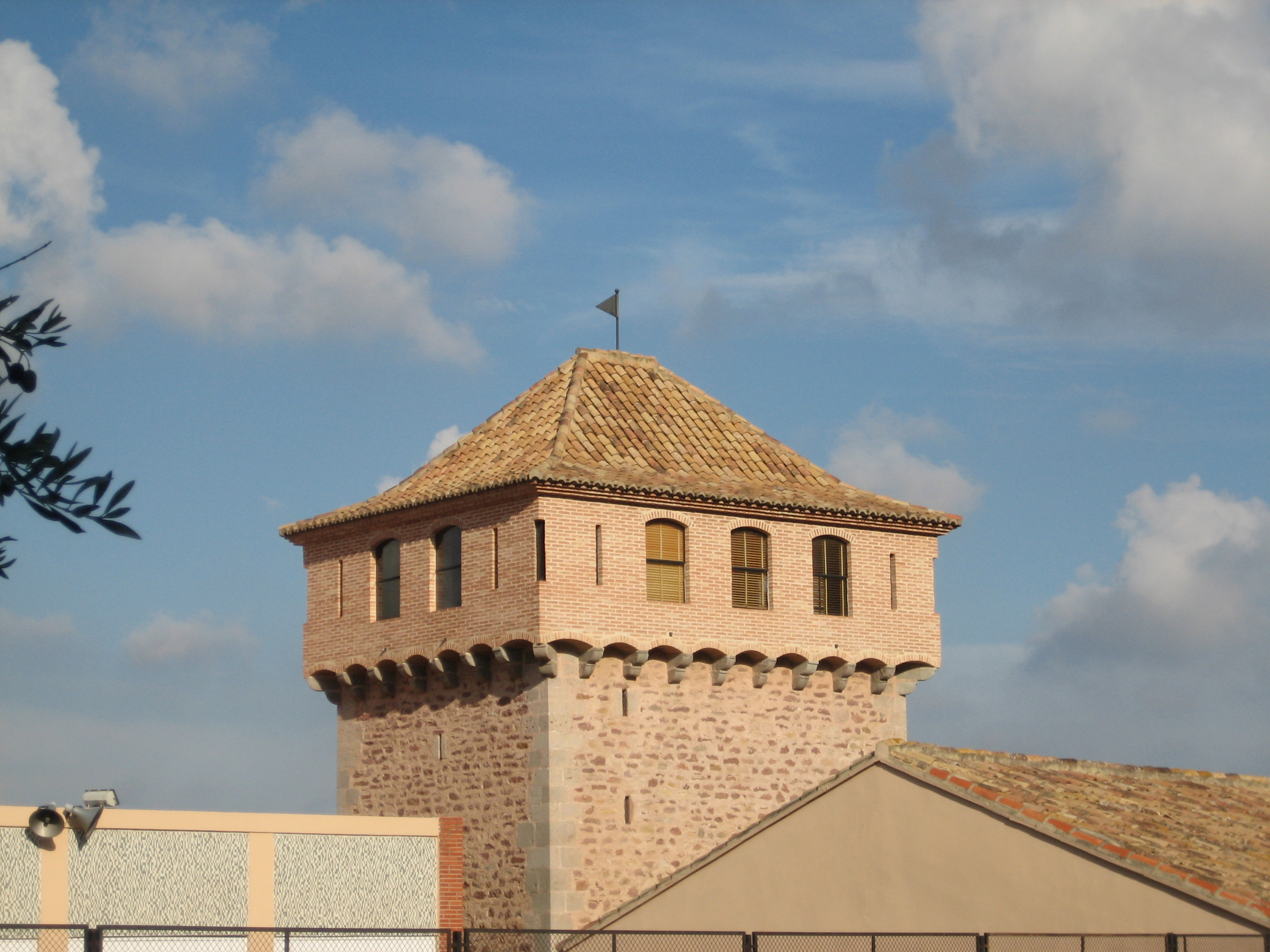 Vista de la parte superior de la Torre de Gilet